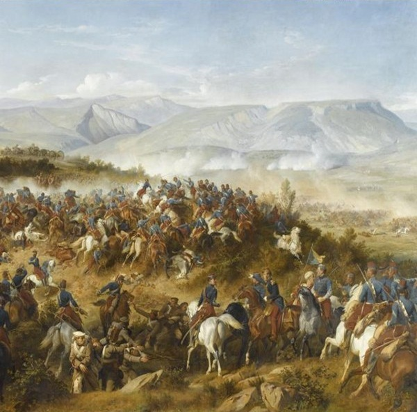 Chasseurs d'Afrique commandé par le général d'Allonville à la bataille de Balaclava. La charge de la brigade légère britannique est visible dans la vallée.